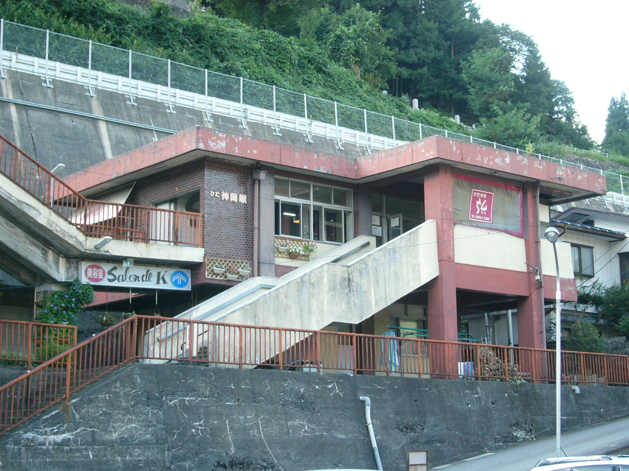 Hida-kamioka Station